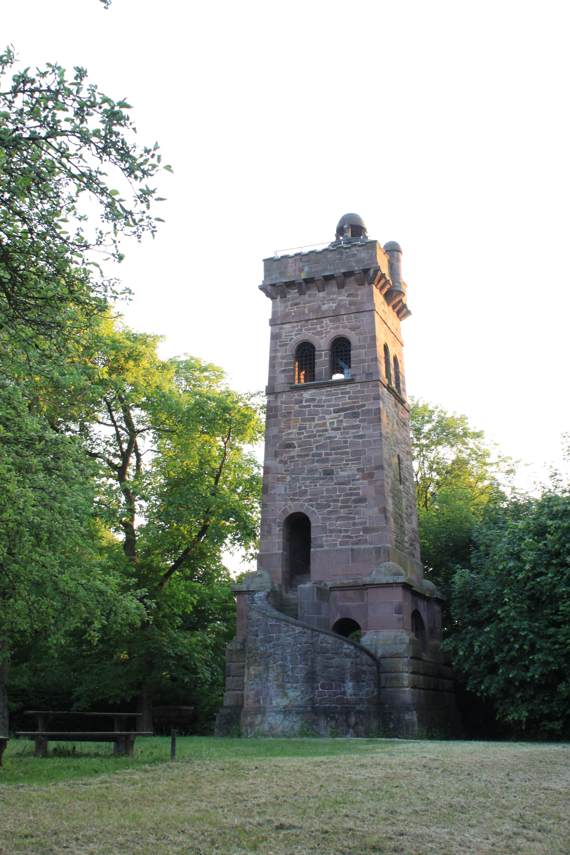 Blick vom Osten des Holzmindener Stadtparks auf den 1908 erbauten Kaiser Wilhelm Turm. Errichtet in Gedenken an Kaiser Wilhelm I. Turmhöhe 17 Meter.